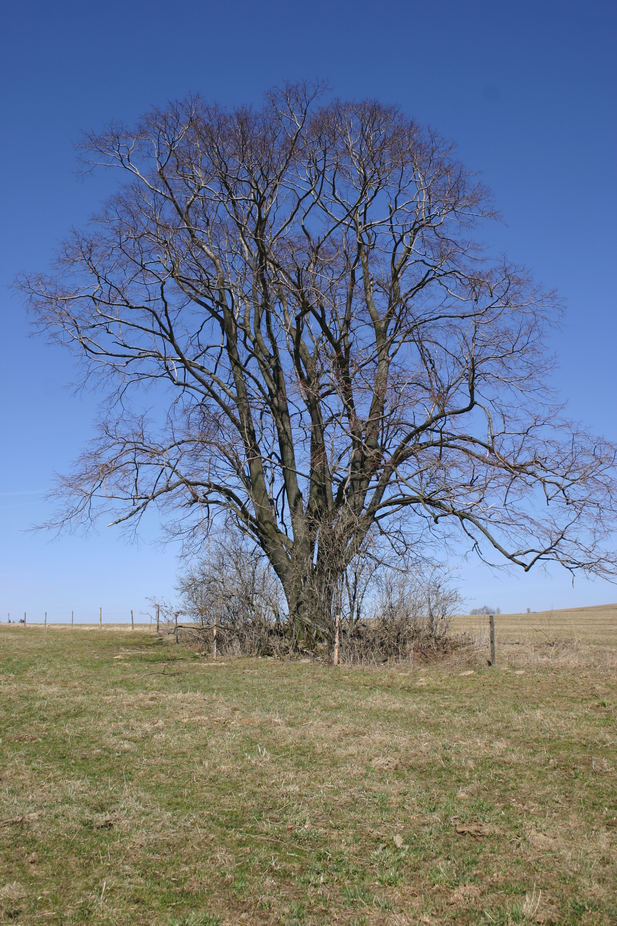 Lípa pod Řasným - Dolní Řasnice